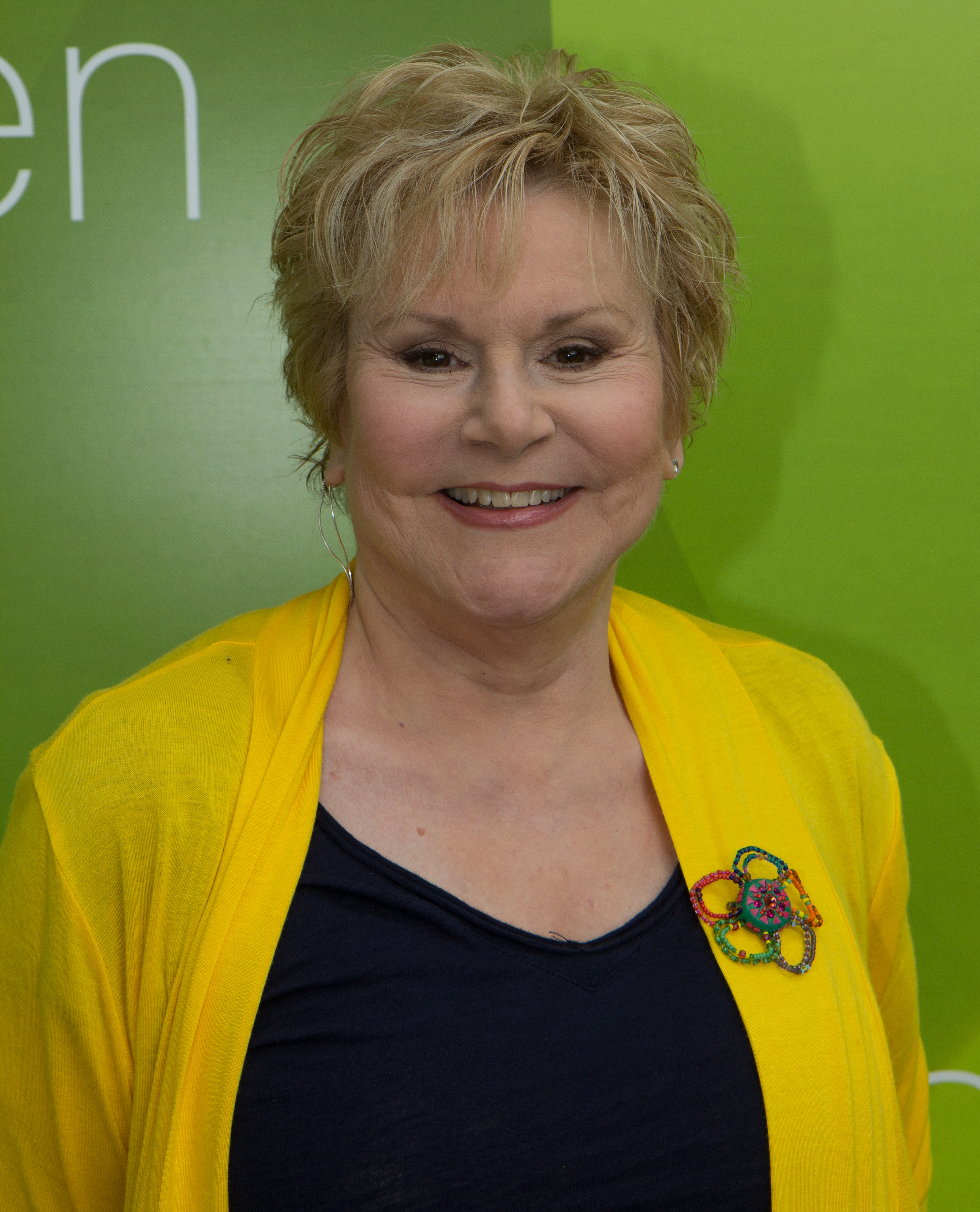 Peggy March als Gast beim ZDF-Fernsehgarten am 24. Juni 2018 in Mainz.